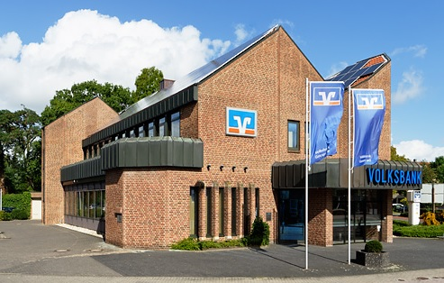 Volksbank Gemen